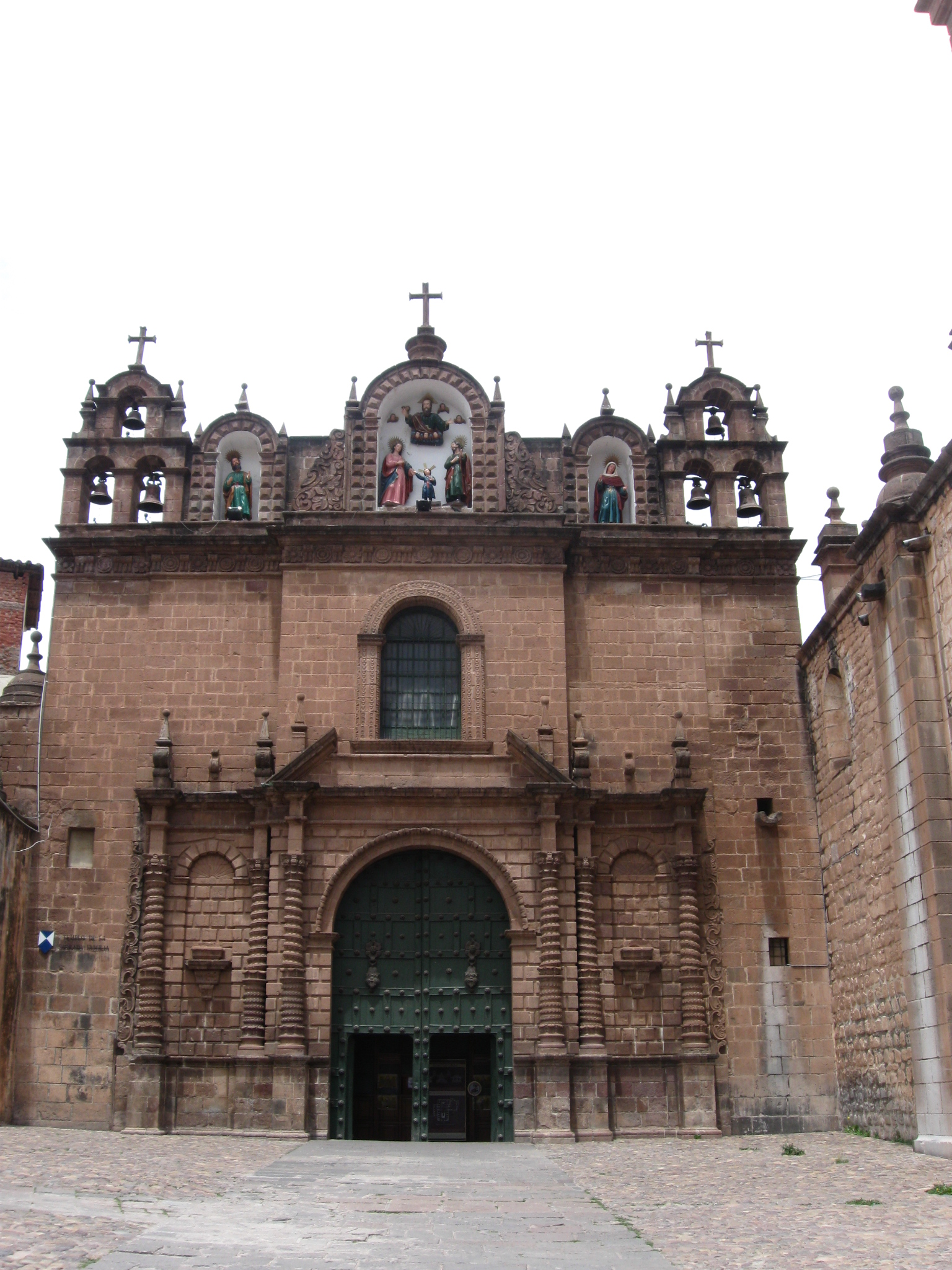 Ubicado hacia la derecha de la Catedral